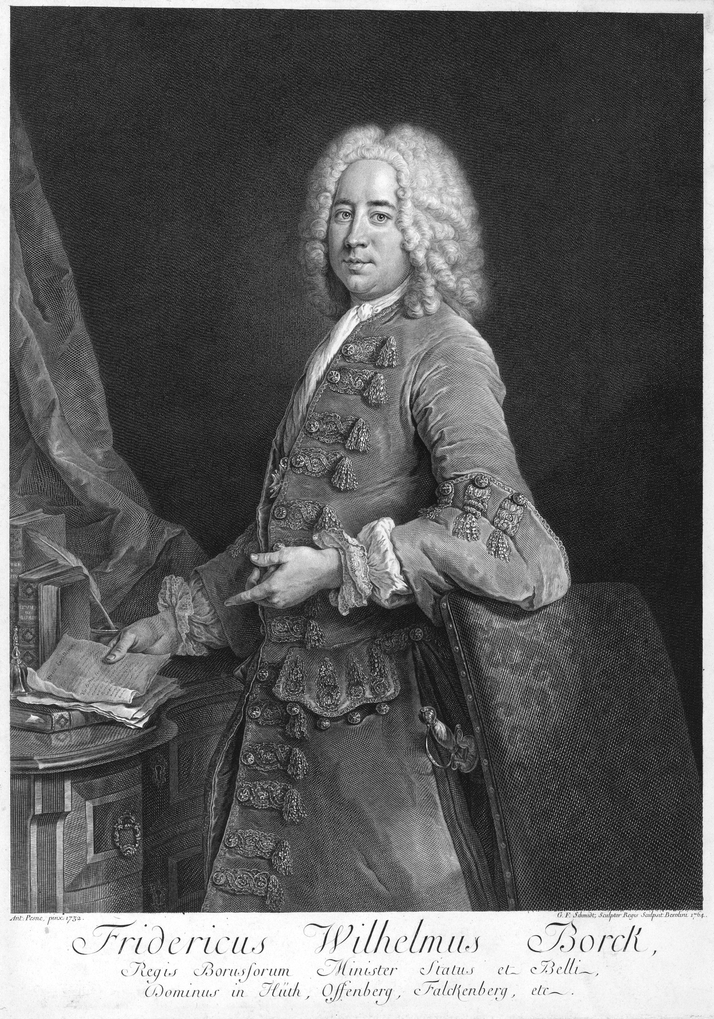 Friedrich Wilhelm von Borcke (* 20. März 1693 in Gersdorff Pommern; † 26. August 1769 in Berlin) war Wirklicher Geheimer Rat und Staatsminister in Hessen-Kassel.